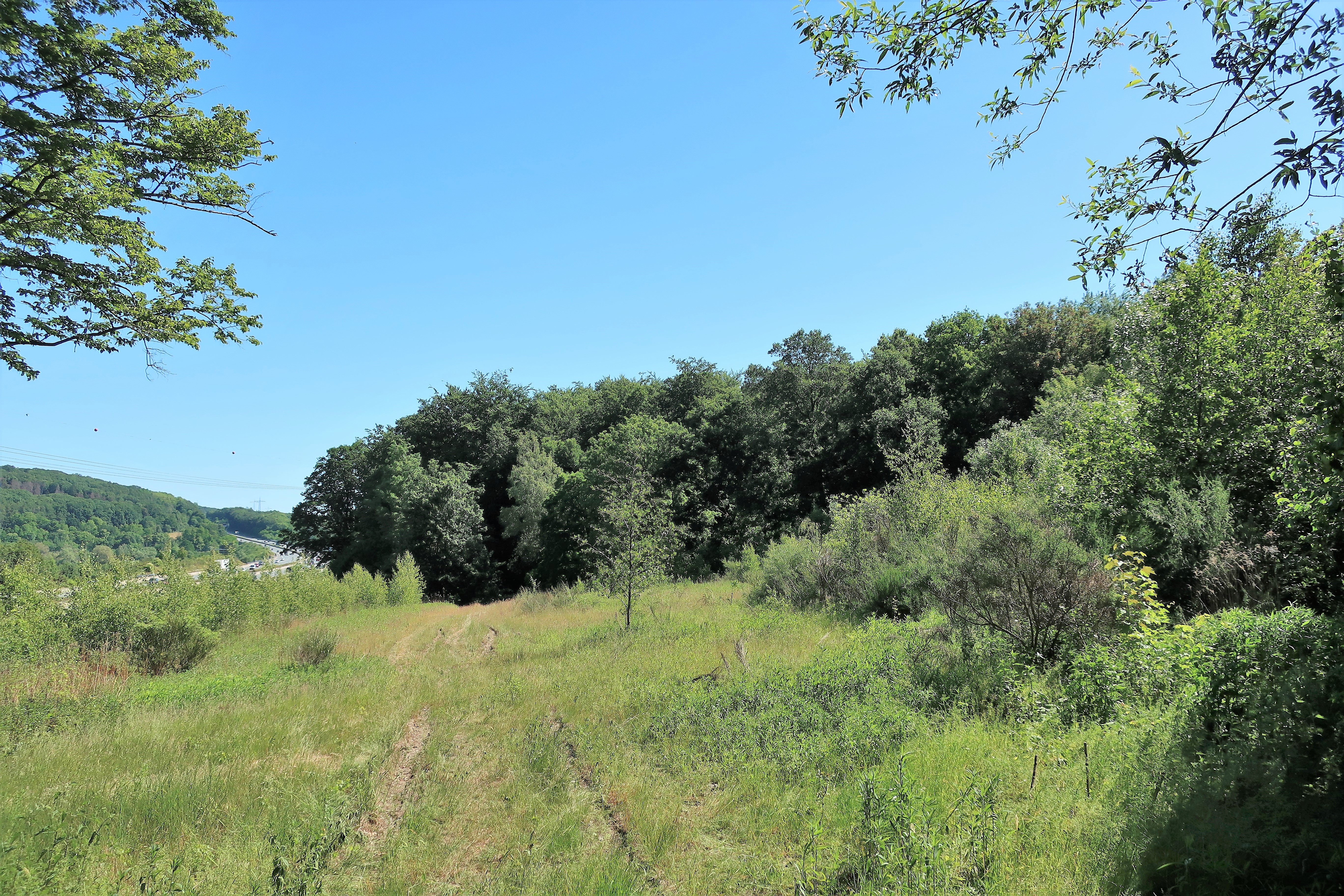 Geschützter Landschaftsbestandteil 1.4.2.1 „Bruchwald in den Espen“ in Hagen-Garenfeld, zwischen A 45, Ruhrtalstraße und Campingplatz. Es handelt sich um quelligen Bach-Erlen-Eschenwald, einer von Pappeln überstandenen Brennessel-Giersch-Flur und einem aus Eichen und Hainbuchen aufgebauten Hangwäldchen.